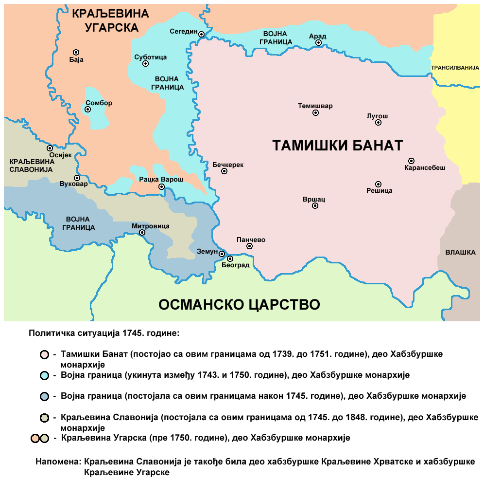 Map of the Banat of Temeswar, Kingdom of Slavonia and Military Frontier in 1745. Мапа Тамишког Баната, Краљевине Славоније и војне границе (1745. година).